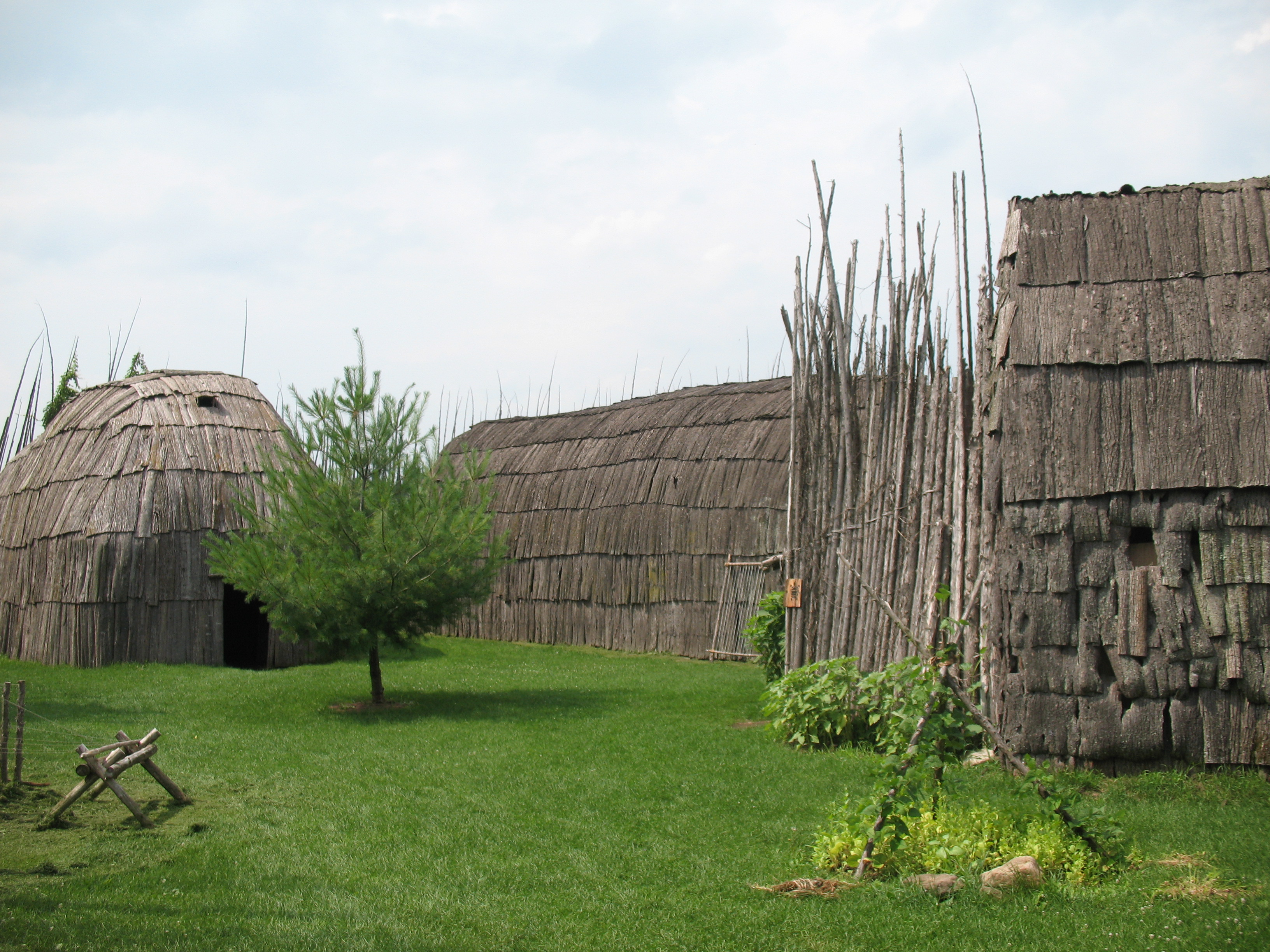 Einige der rekonstruierten Gebäude des Dorfes, das auf dem benachbarten Hügel ausgegraben wird. Es wird geschätzt, dass der Hügel 7 Millionen Artefakte aufweist.